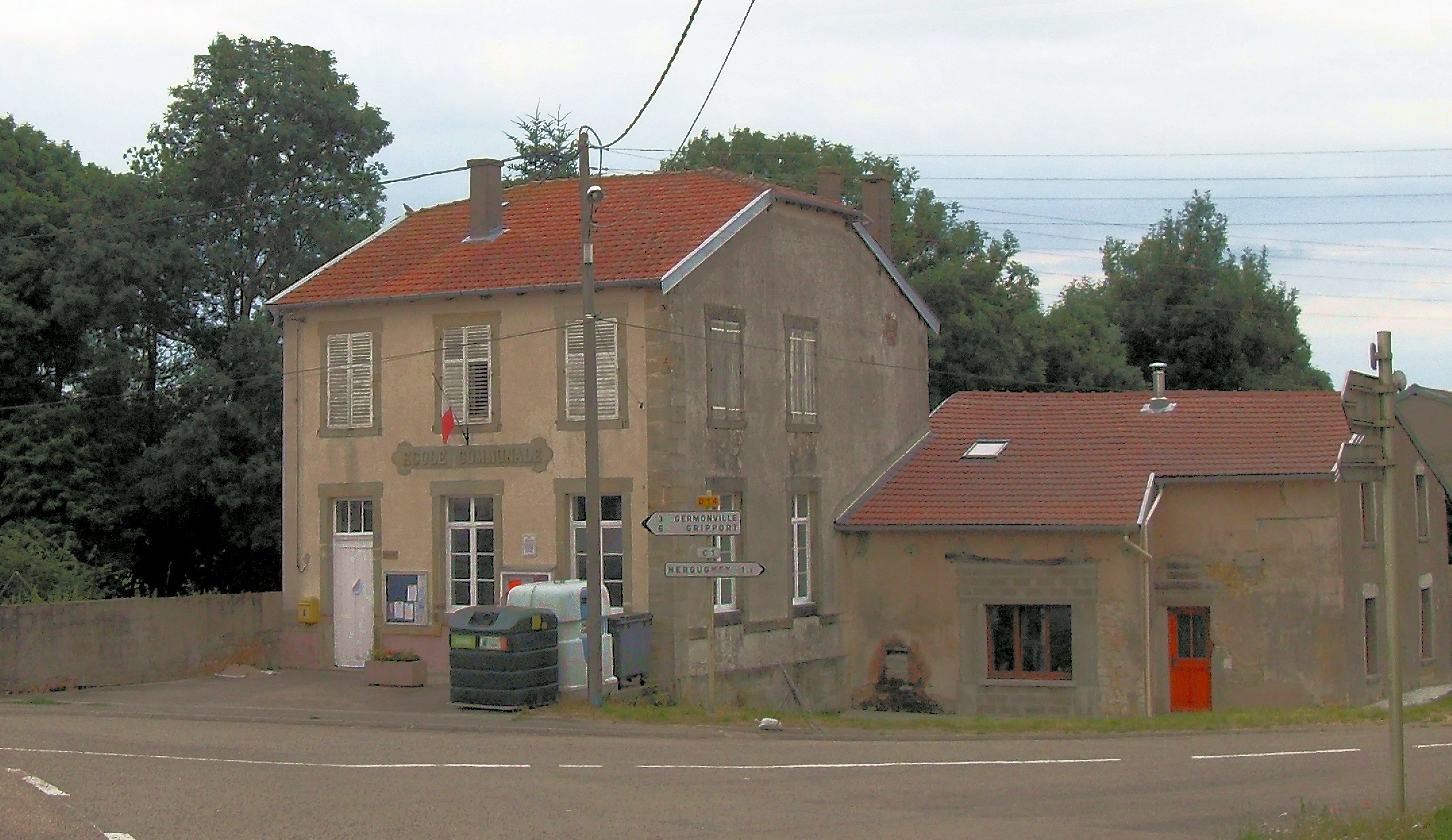 La mairie-école de Battexey